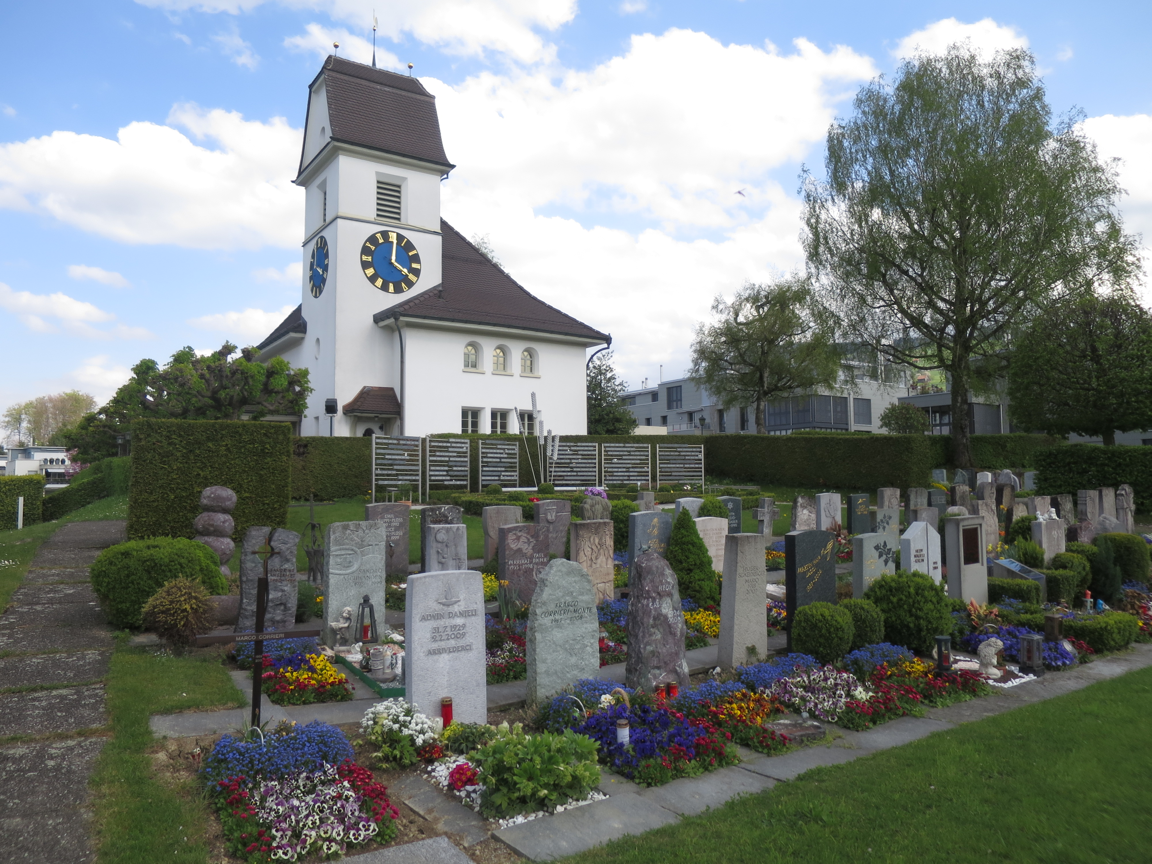 Refoermierte Kirche Wollerau mit Friedhof